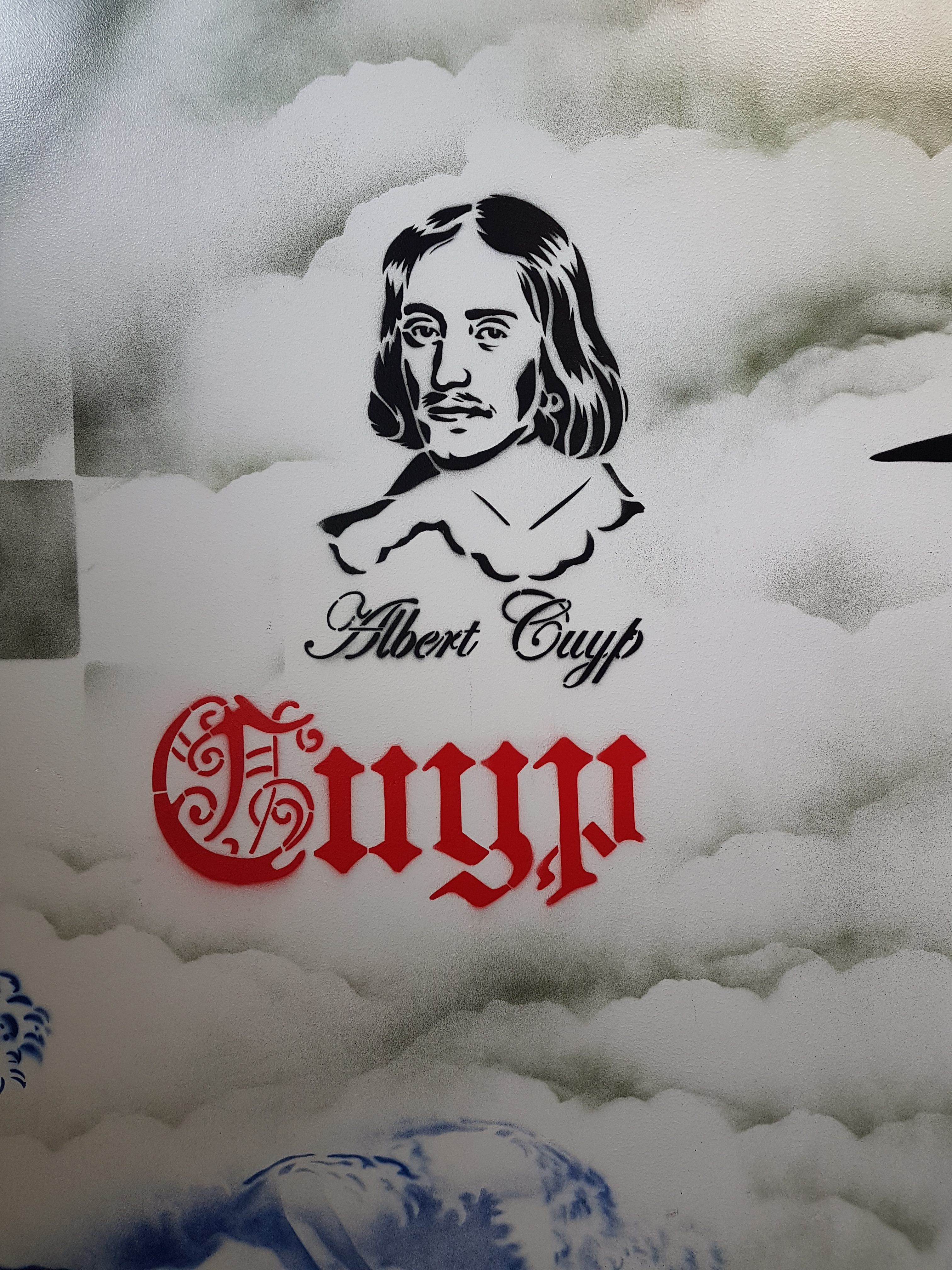 Kunstwerk van Hugo Kaagman, G Doustraat 156, Amsterdam